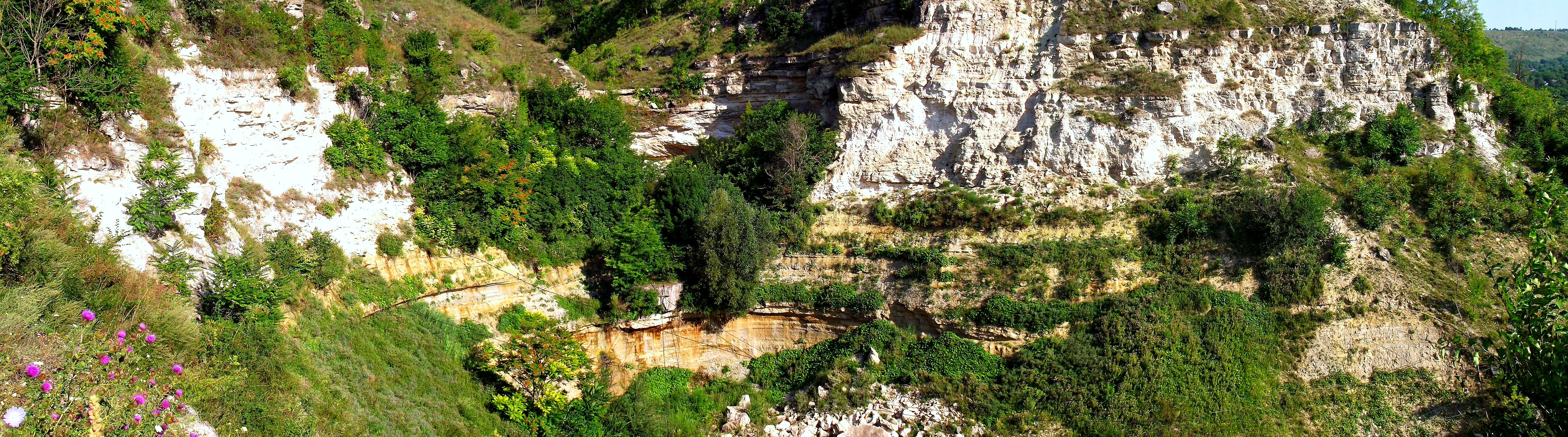 L173.1, Socola, Moldova